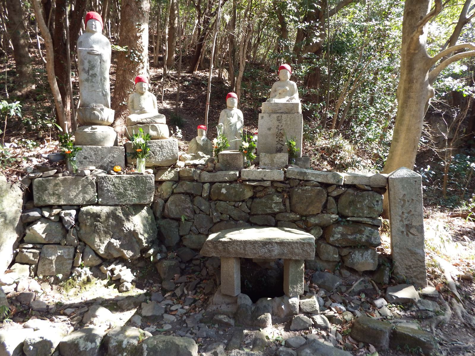 屋島の御加地水